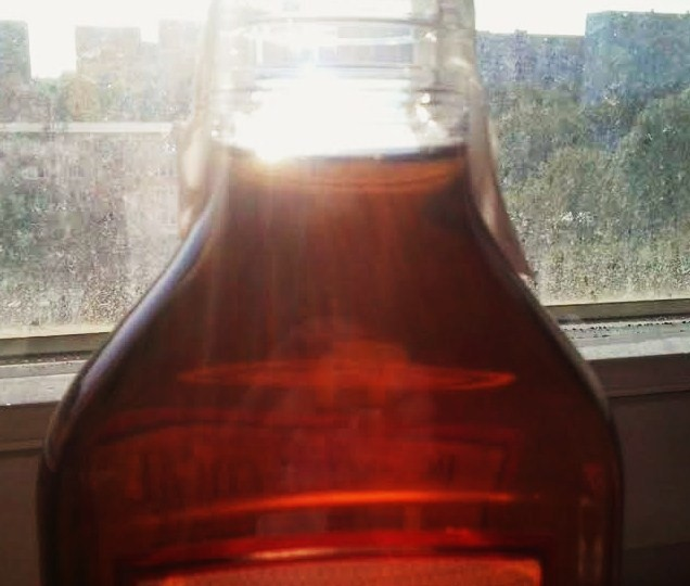 Ronmiel przywieziony z Kanarów do Poznania.